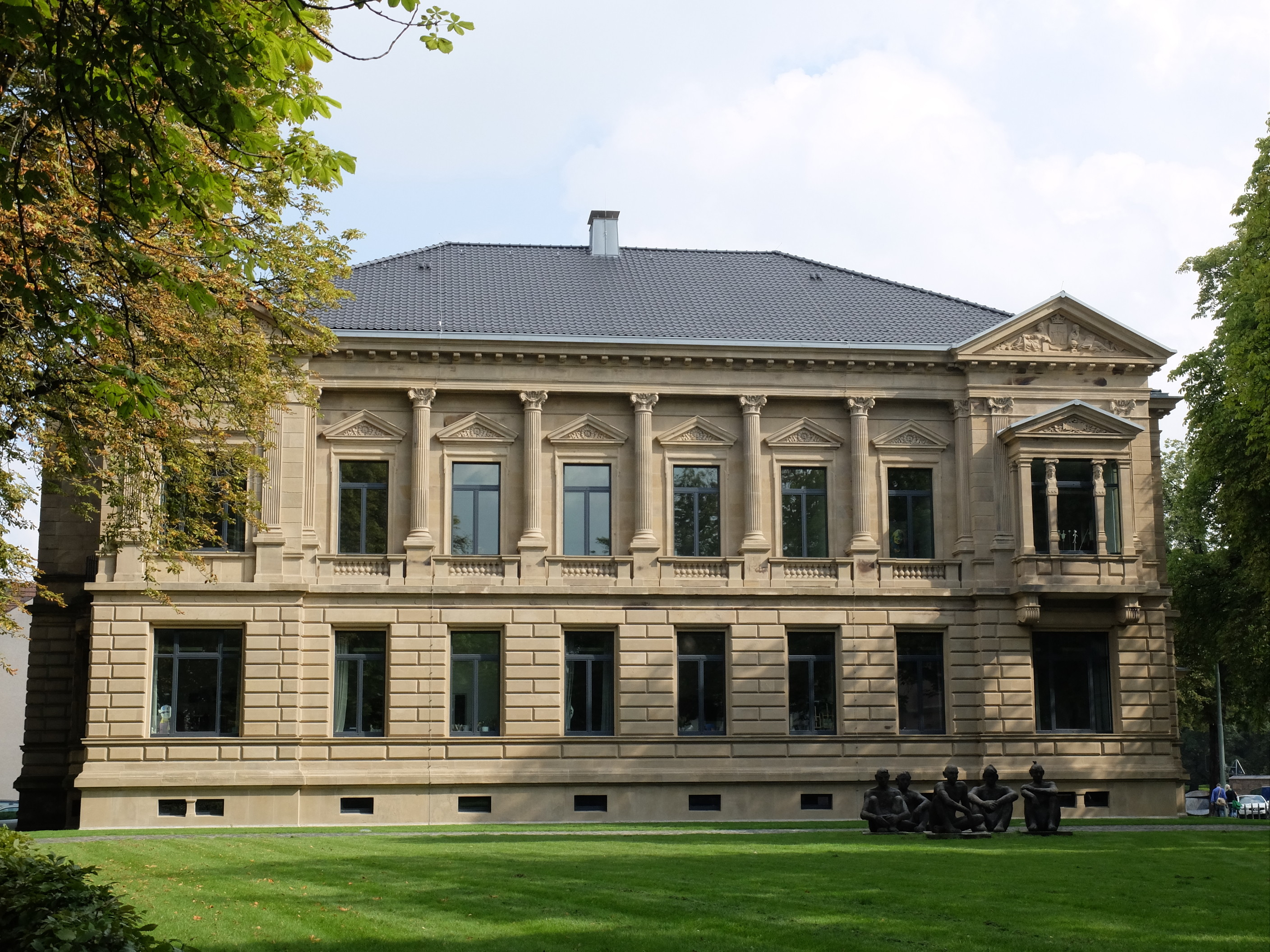 Die Villa Marckhoff (erbaut 1900) beherbergt das Museum Bochum mit seiner Kunstsammlung